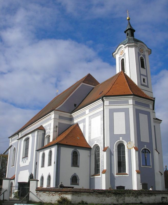 Pfarrkirche St. Vitus (Egling an der Paar, Landkreis Landsberg am Lech, Oberbayern). Ansicht von Südosten. Eigene Aufnahme, Okt. 2006 / Parish church St. Vitus (Egling an der Paar, Upper Bavaria, Germany). Total view from the southeast. Own photo, Oct. 2006